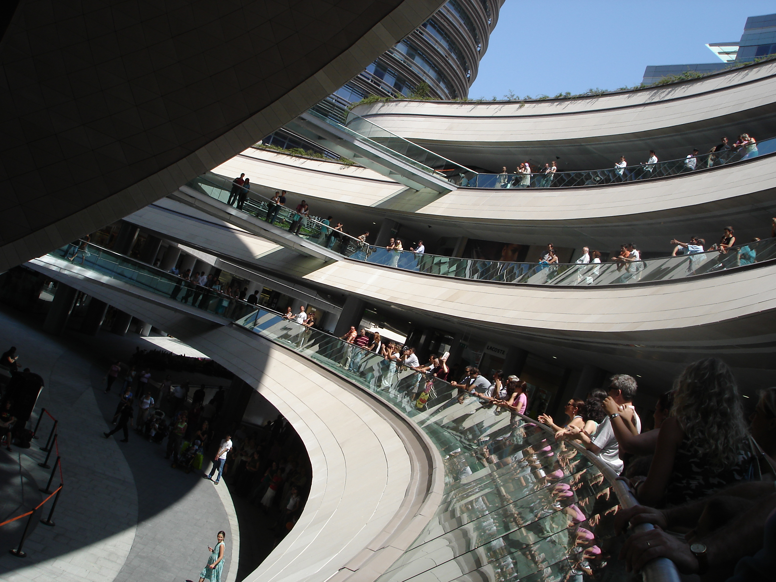 Kanyon shopping center in Istanbul